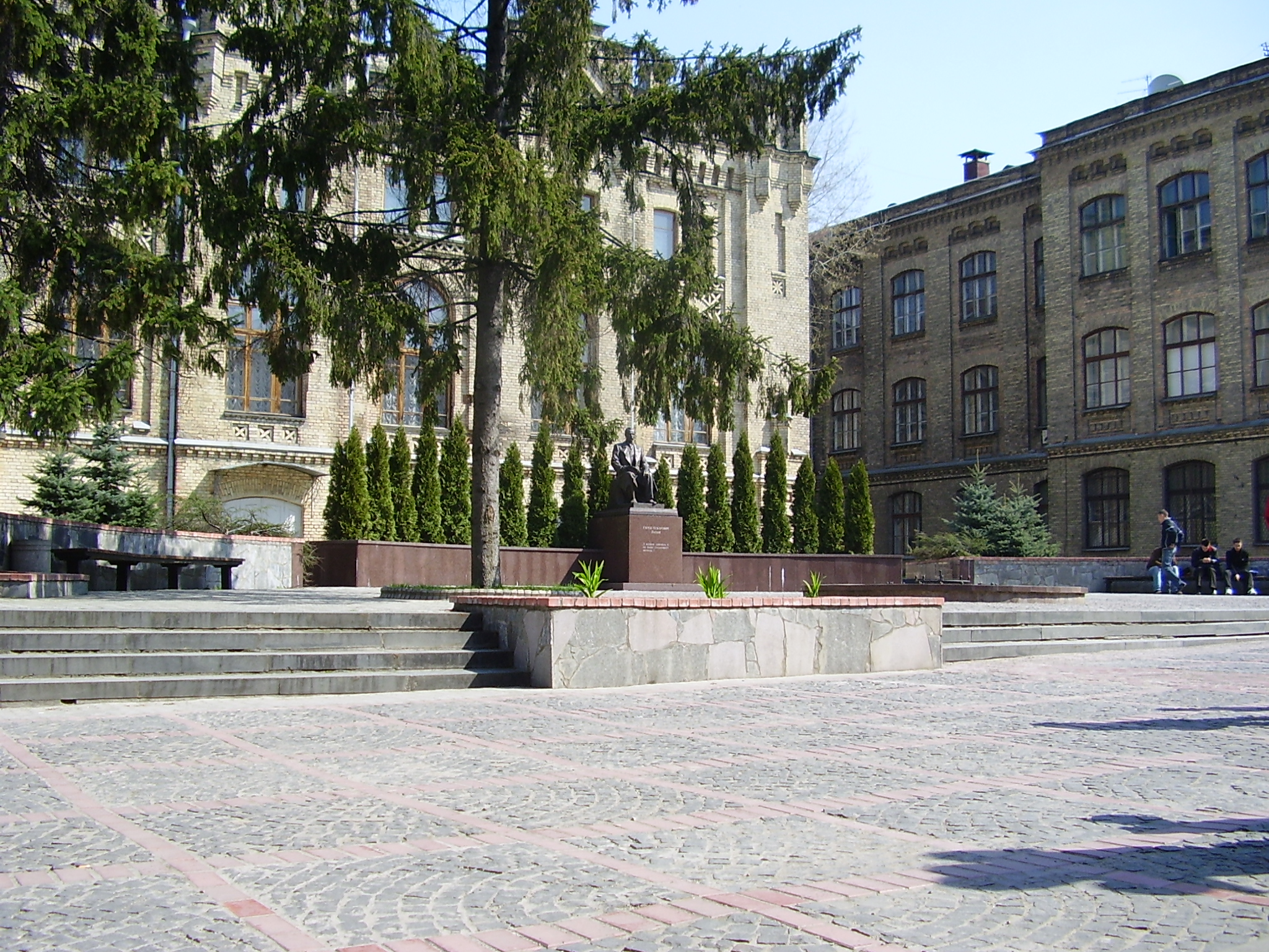 KPI - Paton monument :: Памятник Патону